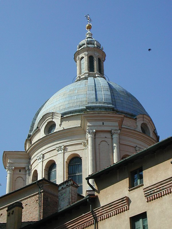 Cupola della Chiesa di Sant'Andrea a Mantova Source: photo uploaded by User:RicciSpeziari. Photographer: Riccardo Speziari